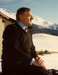 Foto del economista italiano Luigi L. Pasinetti.